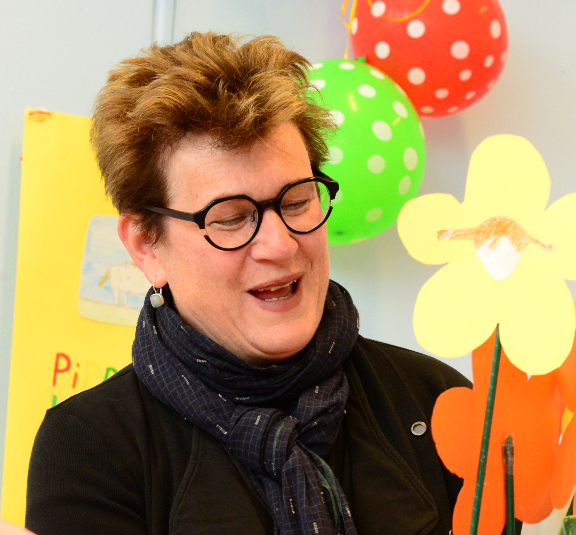 Meg Rosoff at school "Hjulsta grundskola" in Stockholm during the award week of the 2016 Astrid Lindgren Memorial Award (ALMA).